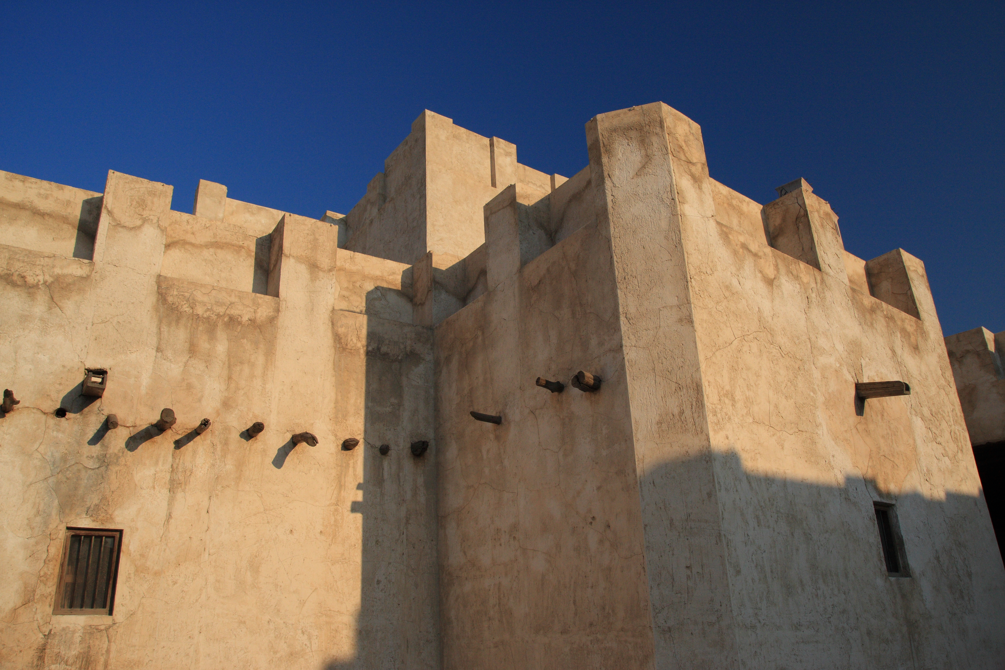 Sharjah Heritage Area